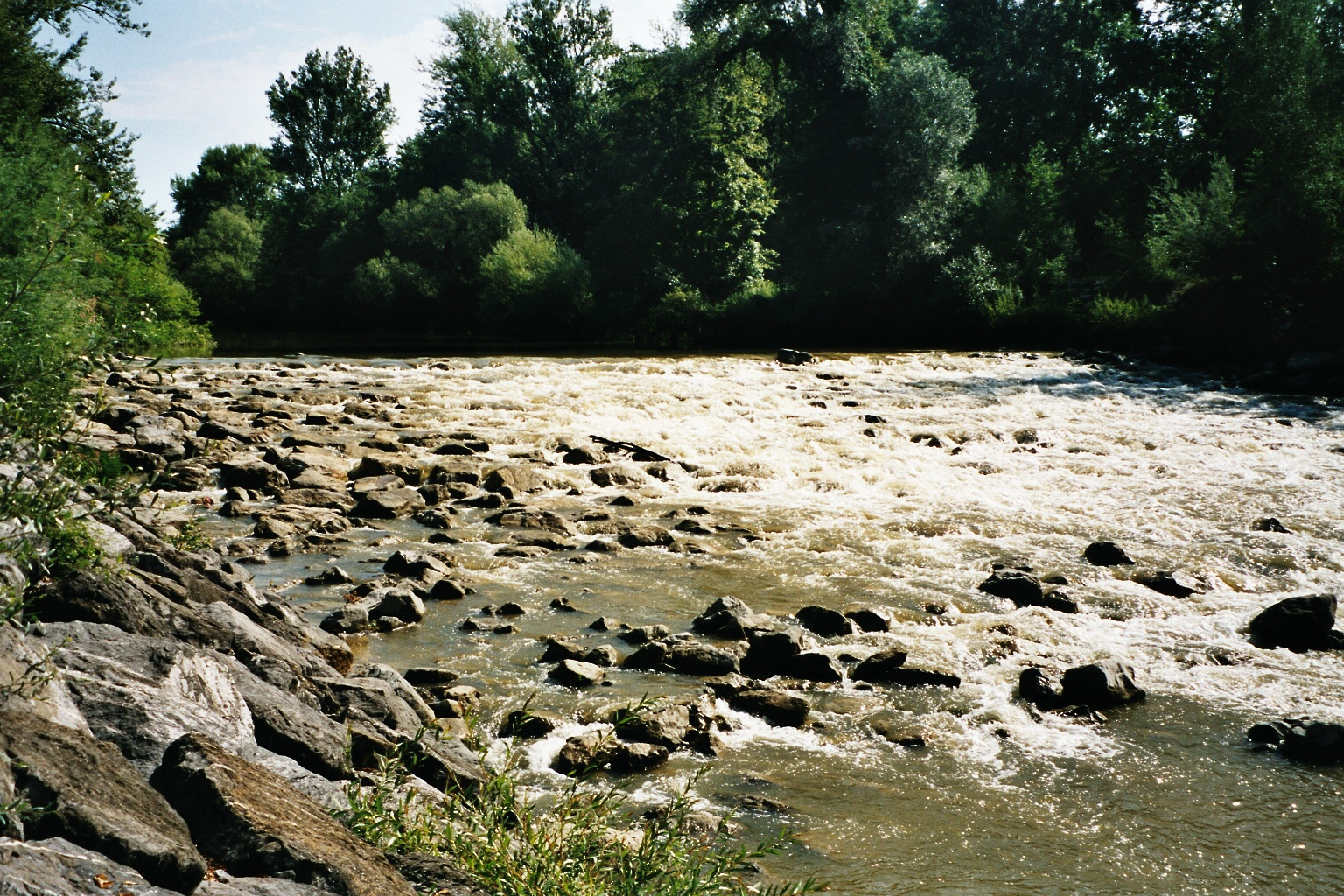 Argen oberhalb der Kabelhängebrücke Langenargen